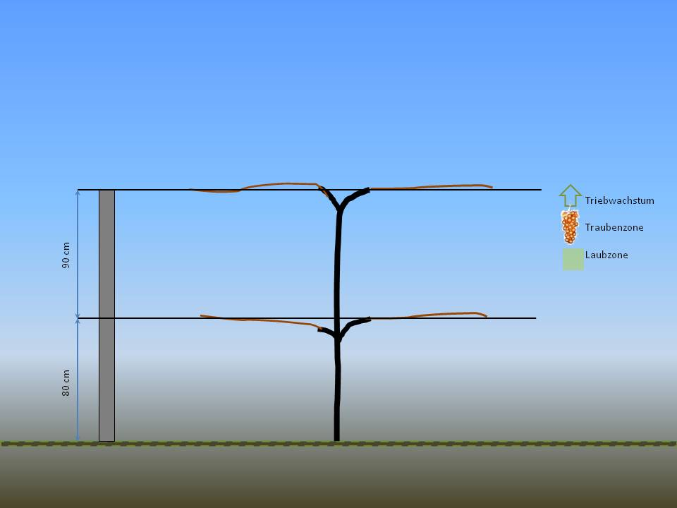 Etagenerziehung mit 4 Armen